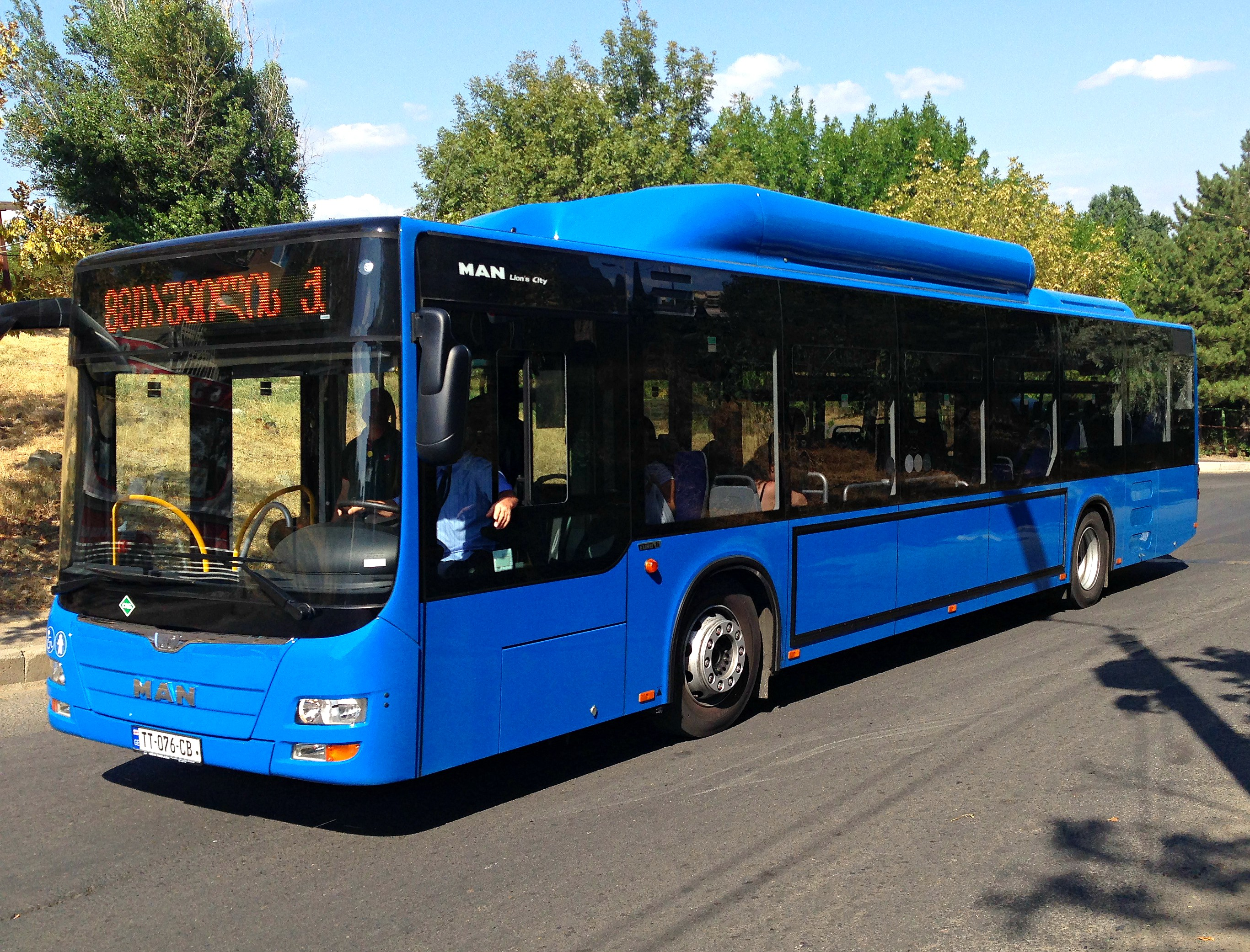 Tbilisi, nutsubidze IV plateau.